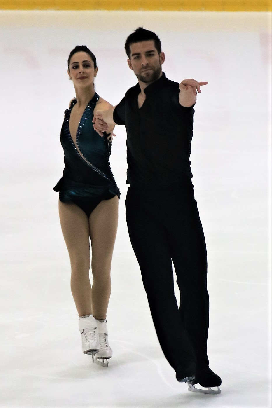 Деанна Стеллато-Дудек / Натан Бартоломей (США) на Гран-при Хельсинки 2018.